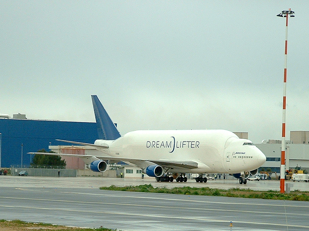 Boing 747-400 LFC Dreamlifter sulla pista dell'aeroporto di Taranto-Grottaglie